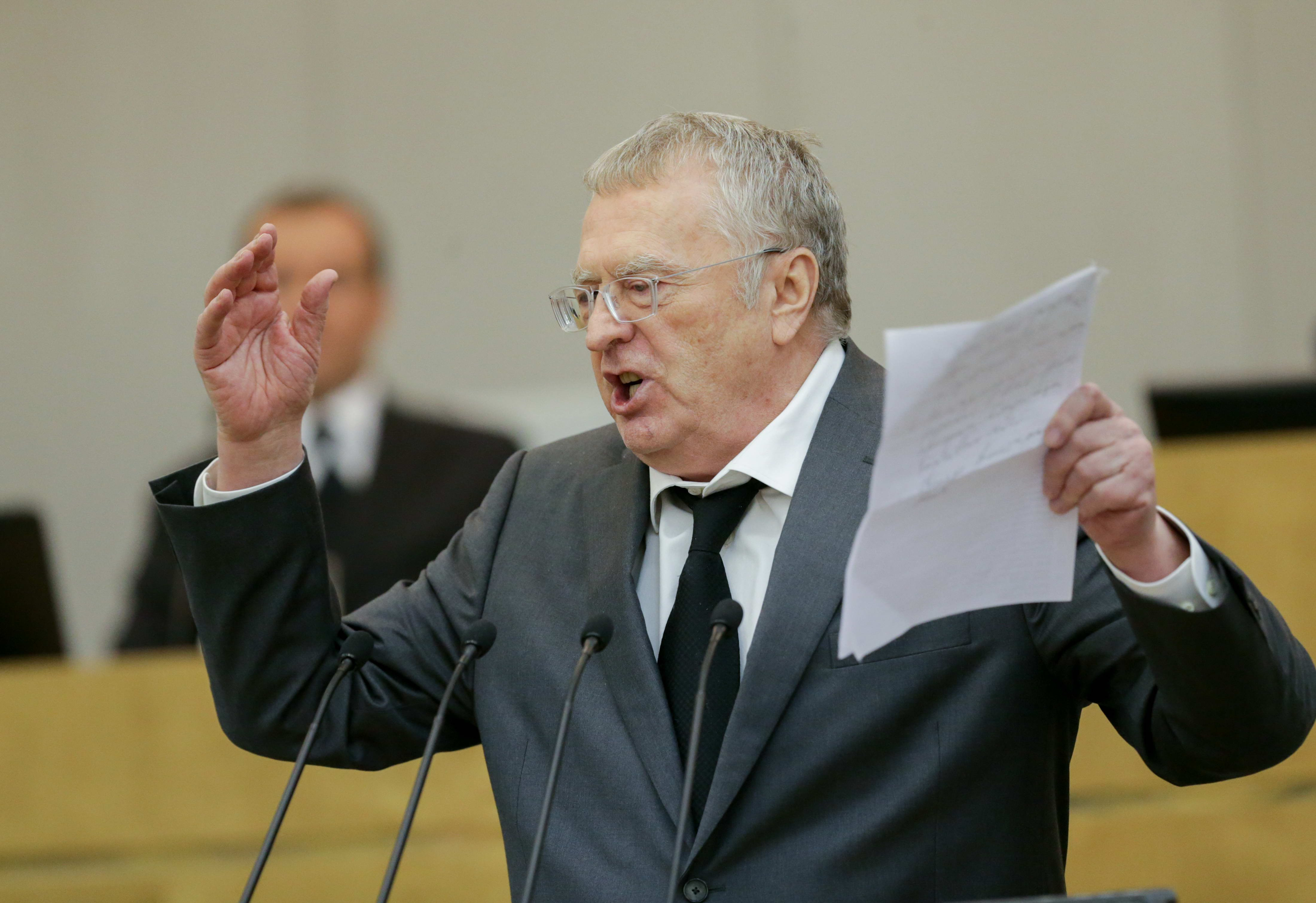 Депутат Госдумы, лидер партии ЛДПР, руководитель фракции ЛДПР в Госдуме В.В. Жириновский